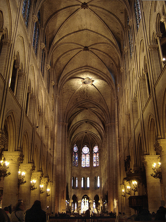 Nef centrale de la cathédrale Notre-Dame de Paris, IVe arrondissement, Paris, France.